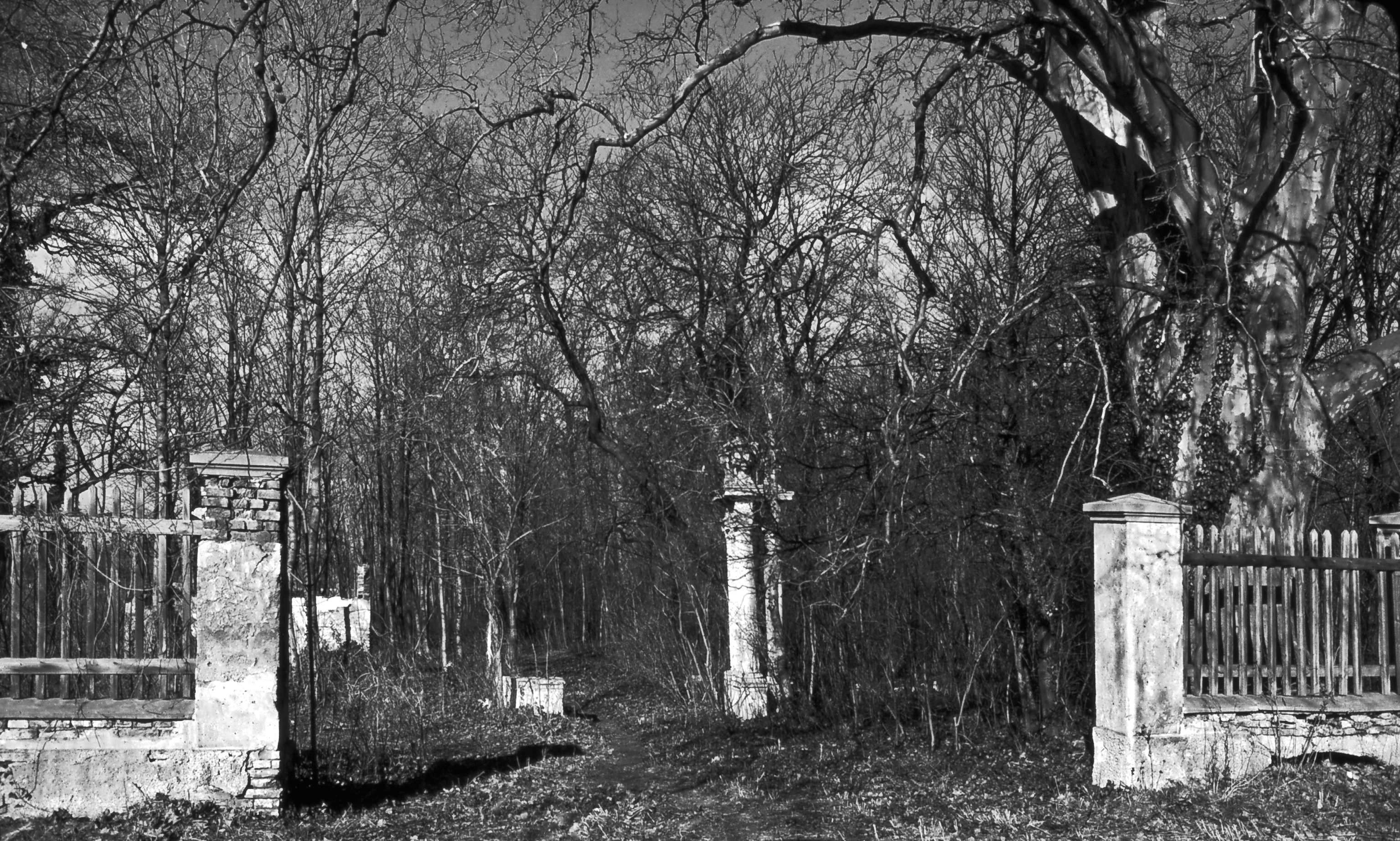 Kleinneusiedl (Niederösterreich), Papierfabrik, Parkeingang